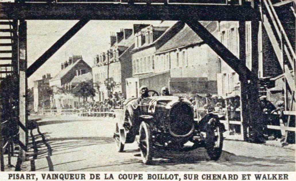 André Pisart vainqueur de la Coupe Georges Boillot en 1923, sur Chenard & Walker.